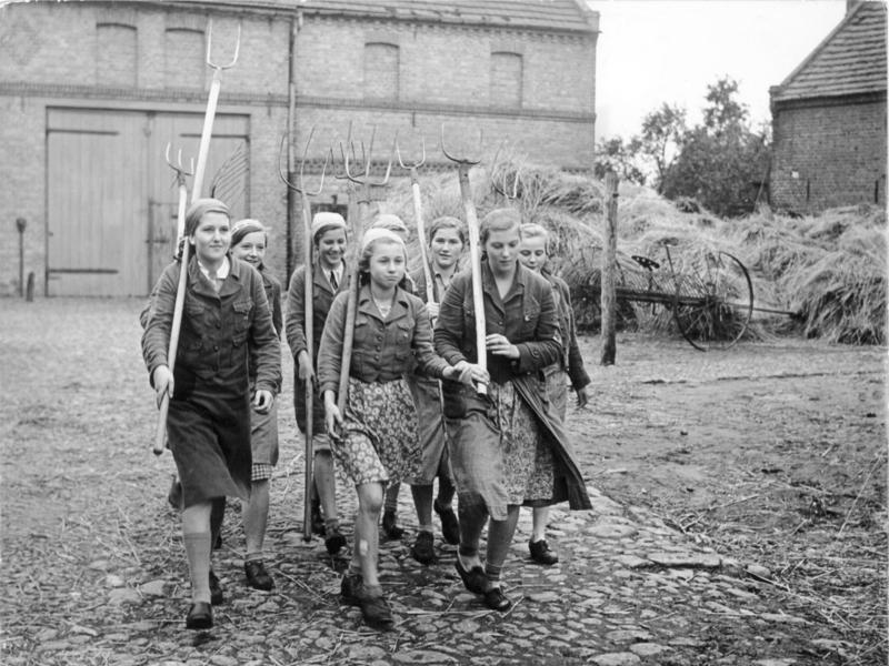 Scherl: Der Einsatz der deutschen Jugend in der Landwirtschaft, BDM-Mädel rücken aus zur Heuernte. 18.9.39